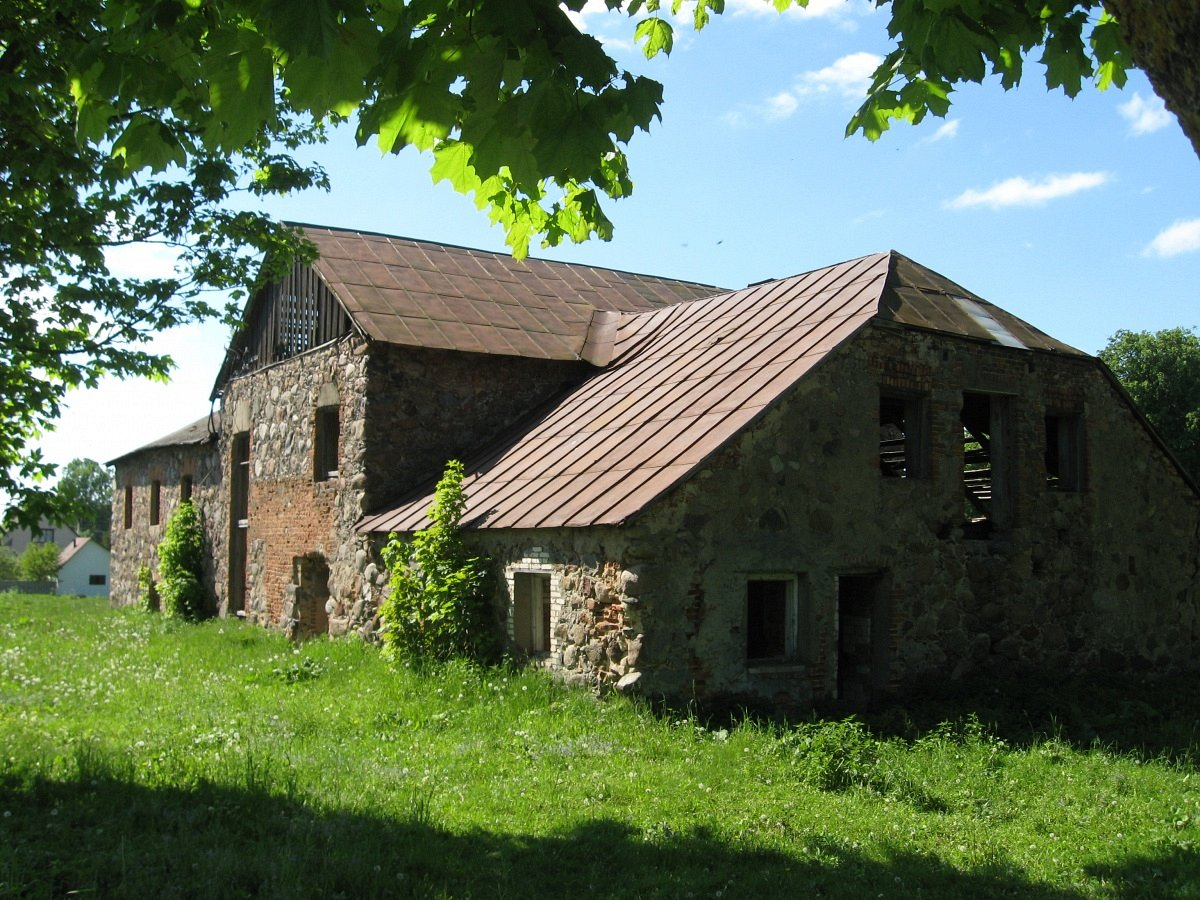 Бабоўня. Гаспадарчая пабудова